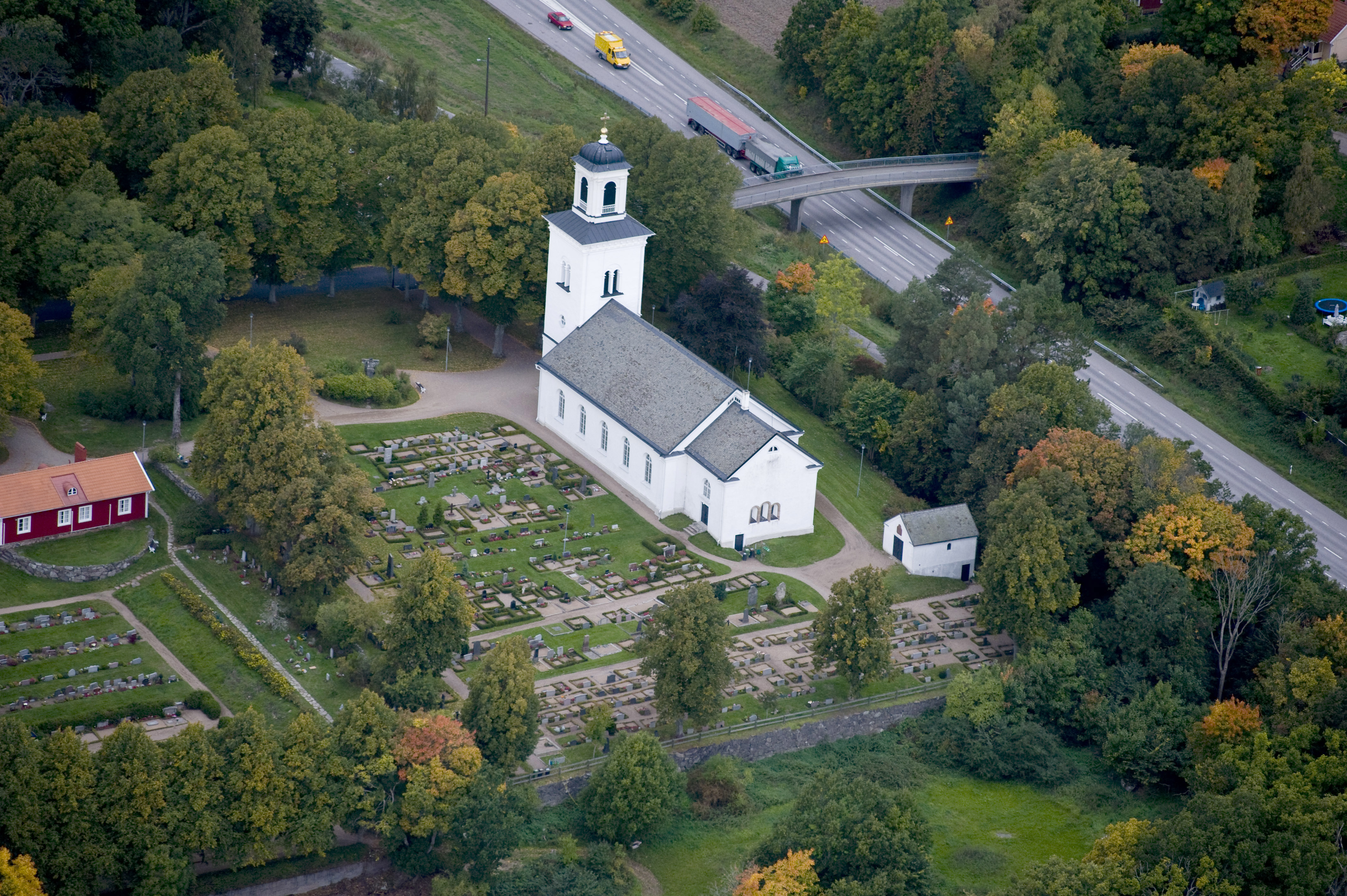 Lösen kyrka från luften